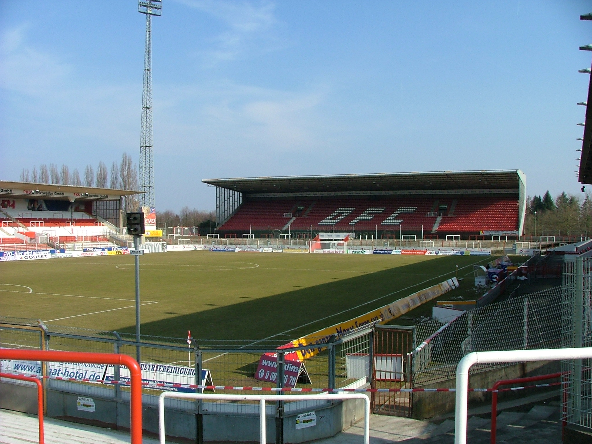 Stadion am Bieberer Berg, Offenbach am Main, Germany